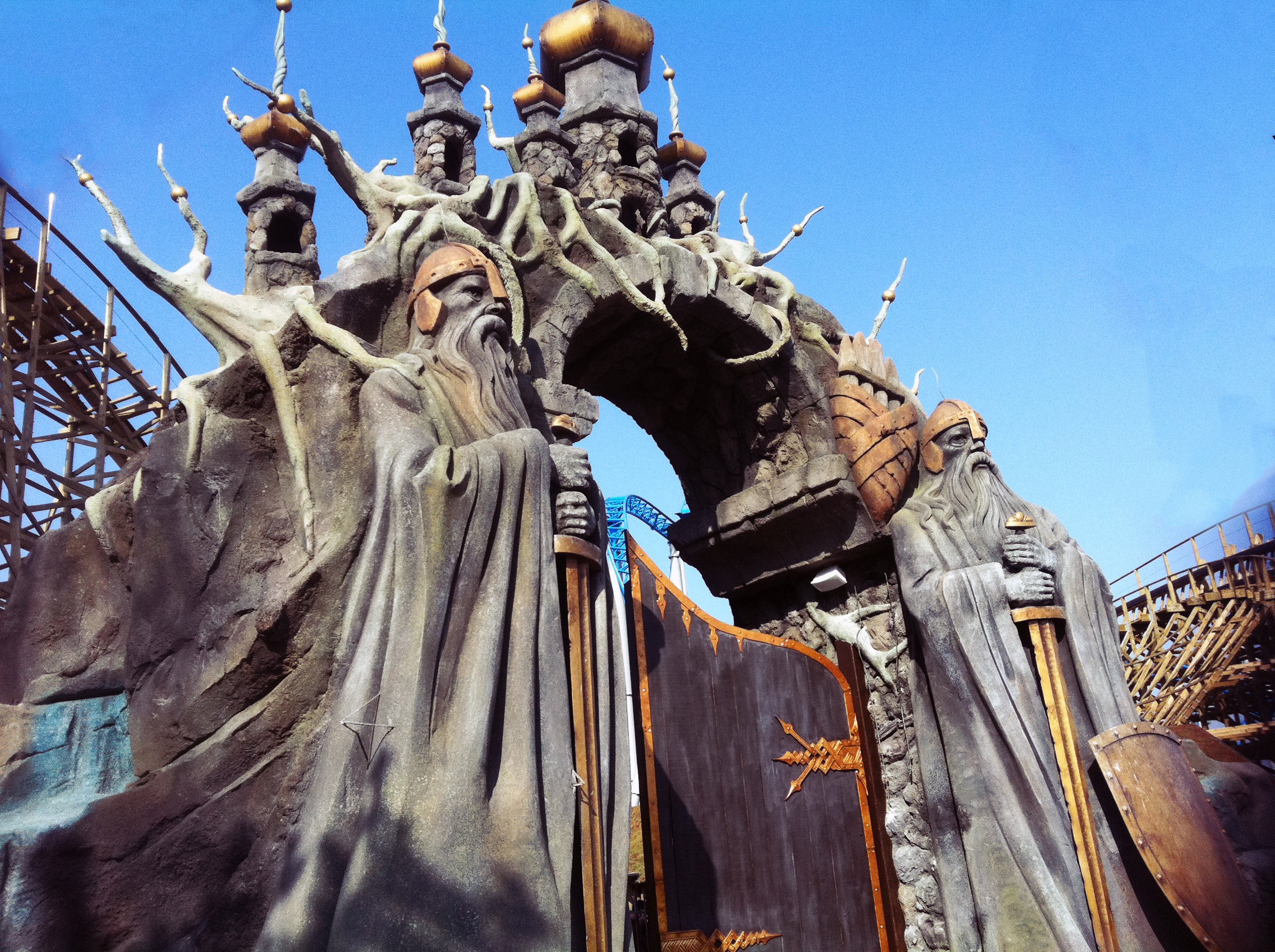 La société AAB a réalisé tous les décors rocheux du dernier coaster « Wodan » où la structure a été réalisée totalement en bois.